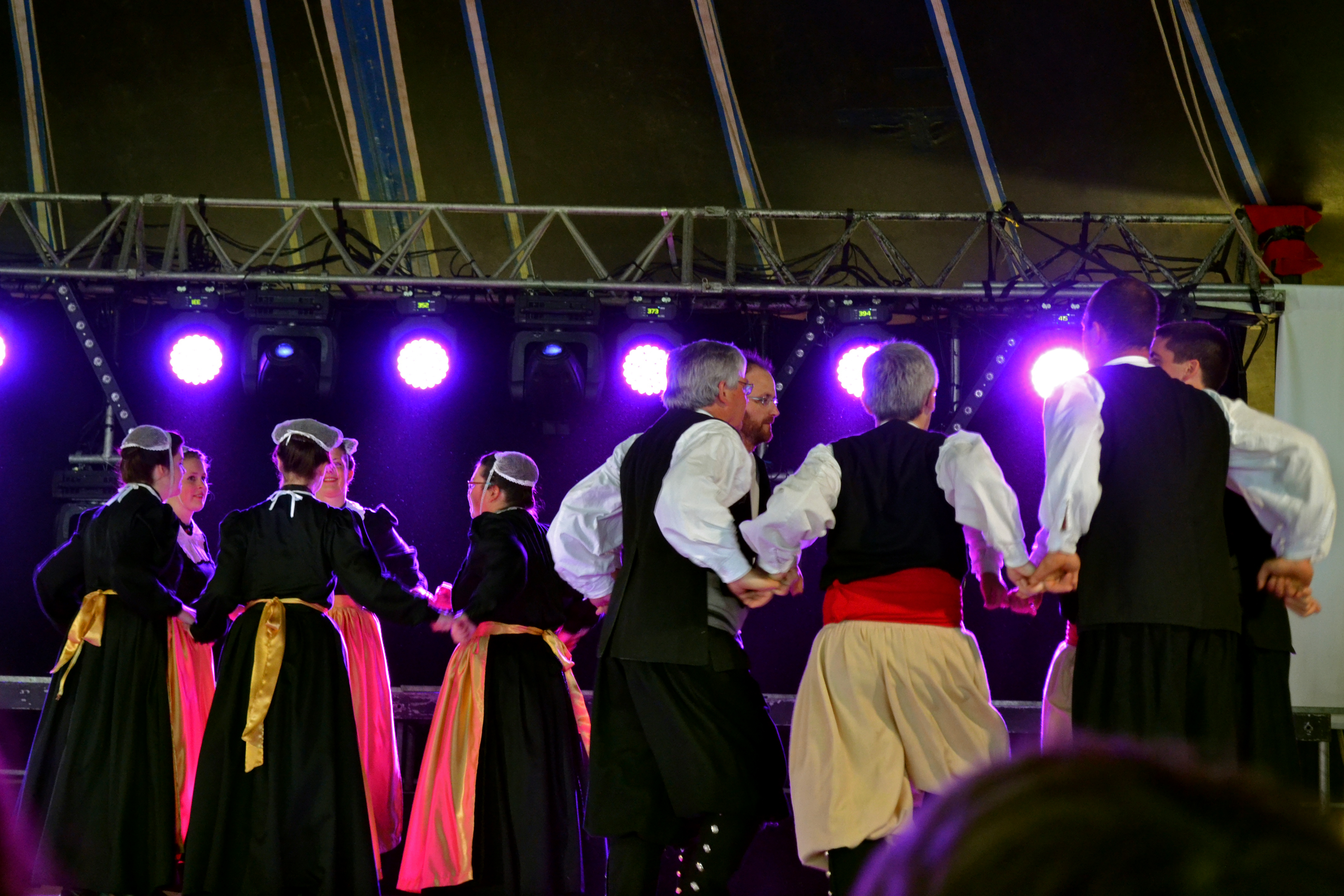 Les Korollerien Montroulez cercle celtique de Morlaix au Gouel Bro Leon à Plouvorn le 16 juin 2013.